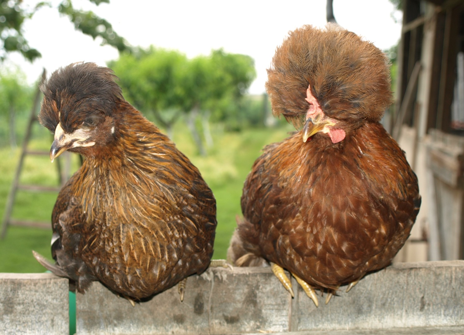 Poszavinai búbos tyúk